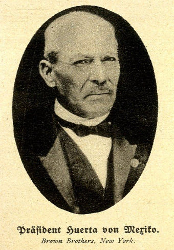 Präsident Victoriano Huerta von Mexiko, c. 1914